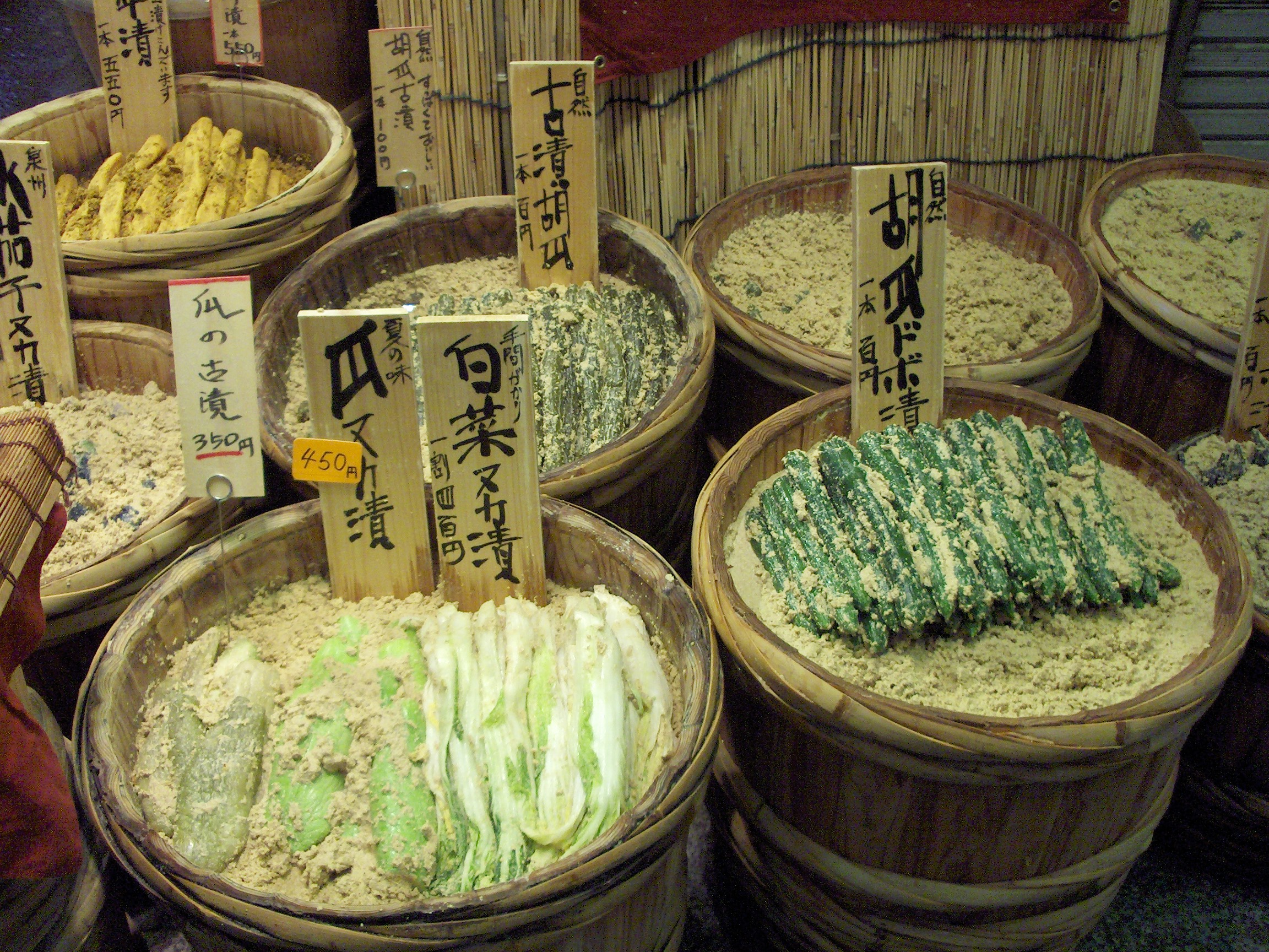 nishiki food market, kyoto, pickled vegetables (nukamiso)HPIM0585